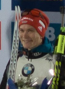 Benedikt Doll vid tävlingar i Östersund 2016